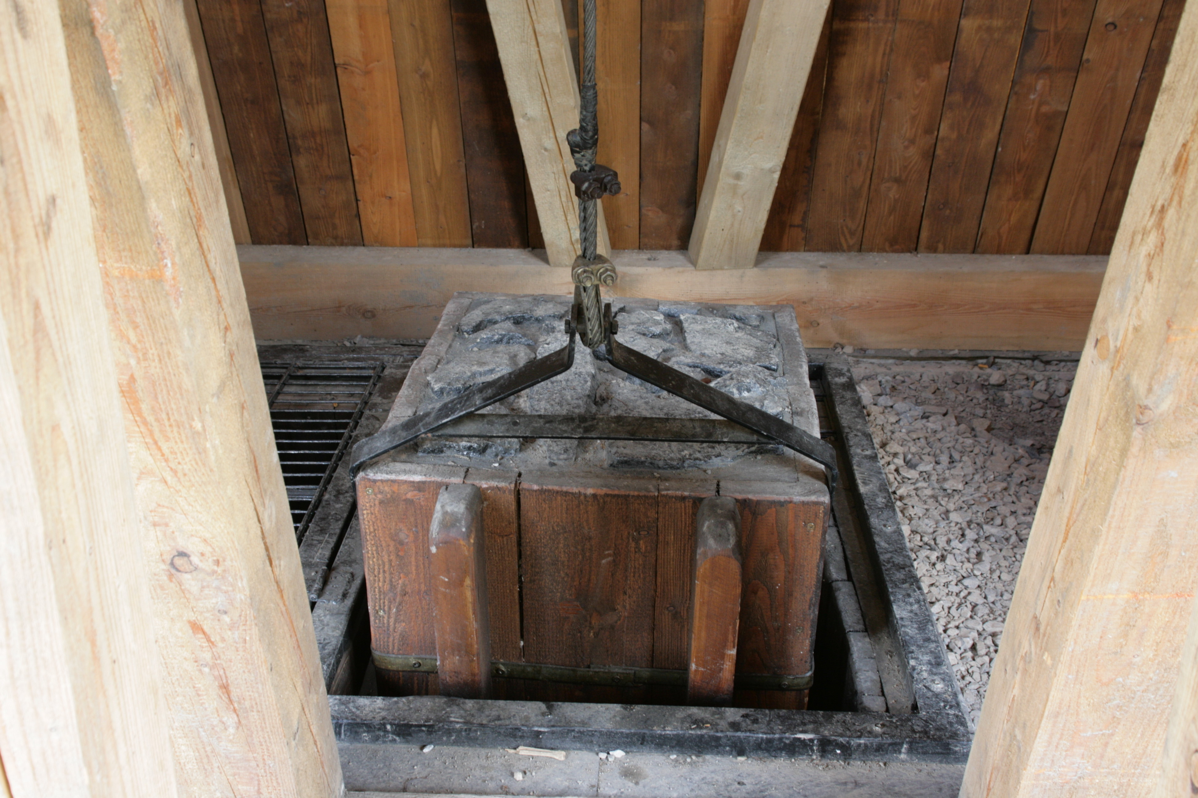 Schacht Margarethe von Zeche Hermann im Muttental von Witten